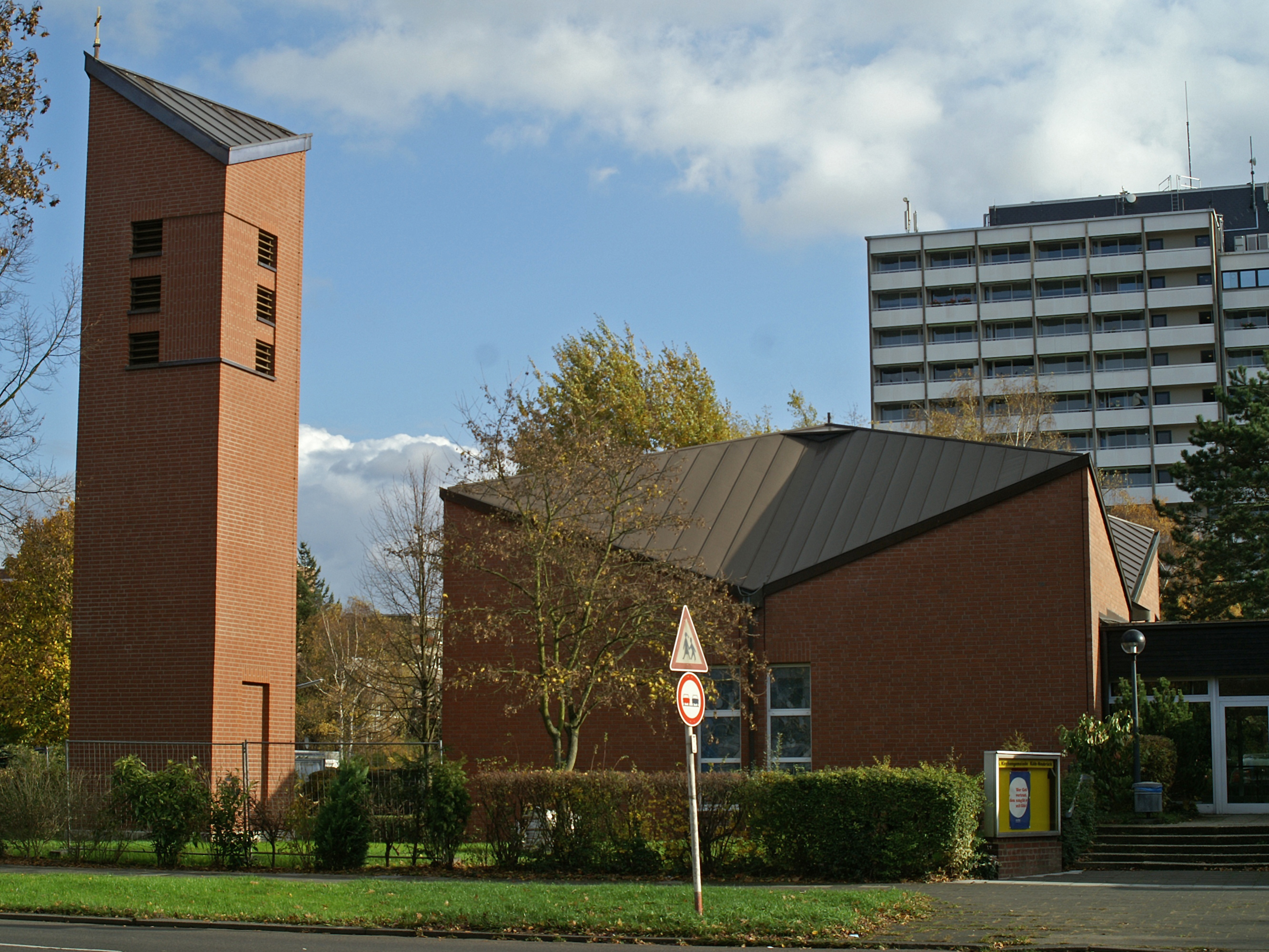 Trinuitatiskirche in Köln-Neubrück